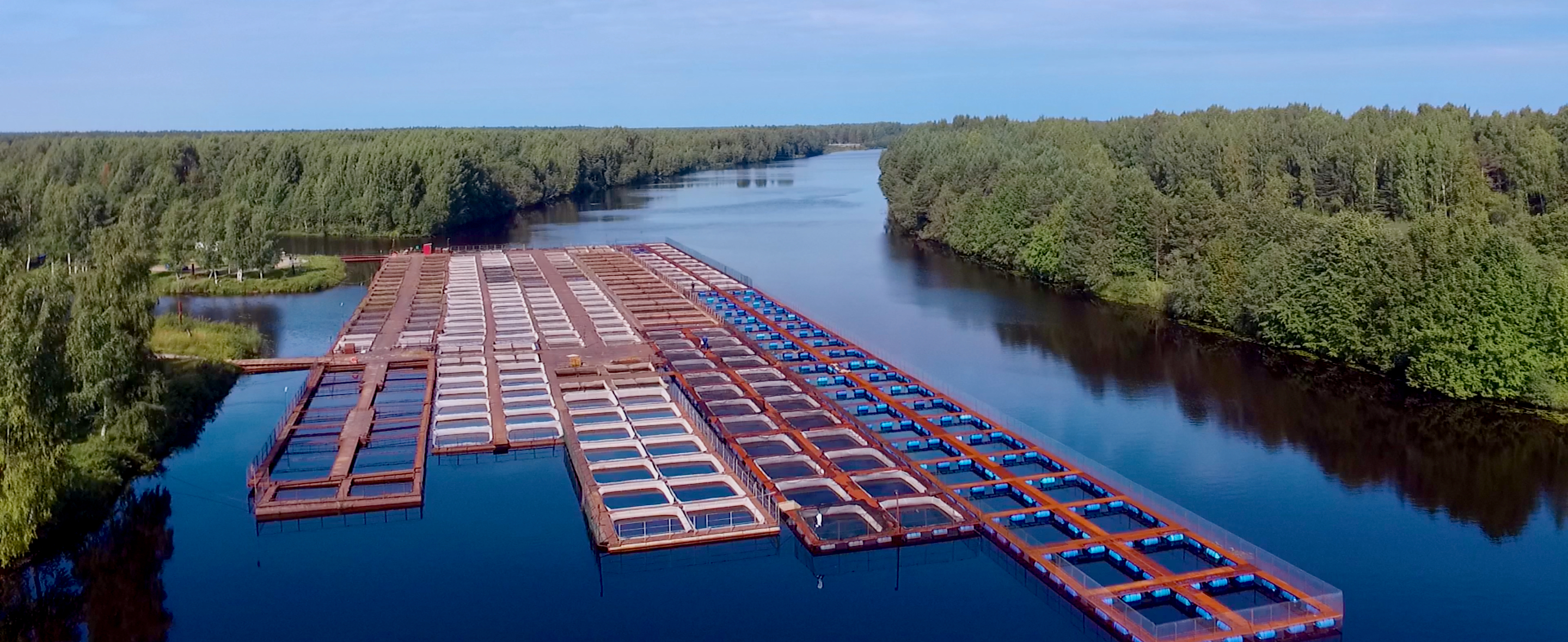 Садки на реке Суда